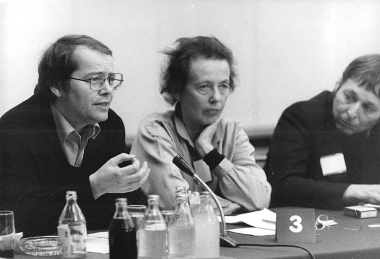 ADN-ZB Junge 4.1.82 Berlin: An der "Berliner Begegnung zur Friedensförderung" von Schriftstellern, Künstlern und Wissenschaftlern aus europäischen Ländern am 13. und 14.12.81 nahmen aus der DDR der Schriftsteller Volker Braun, die Regisseurin Ruth Berghaus und der Bildhauer Wieland Förster (v.l.n.r.) teil.